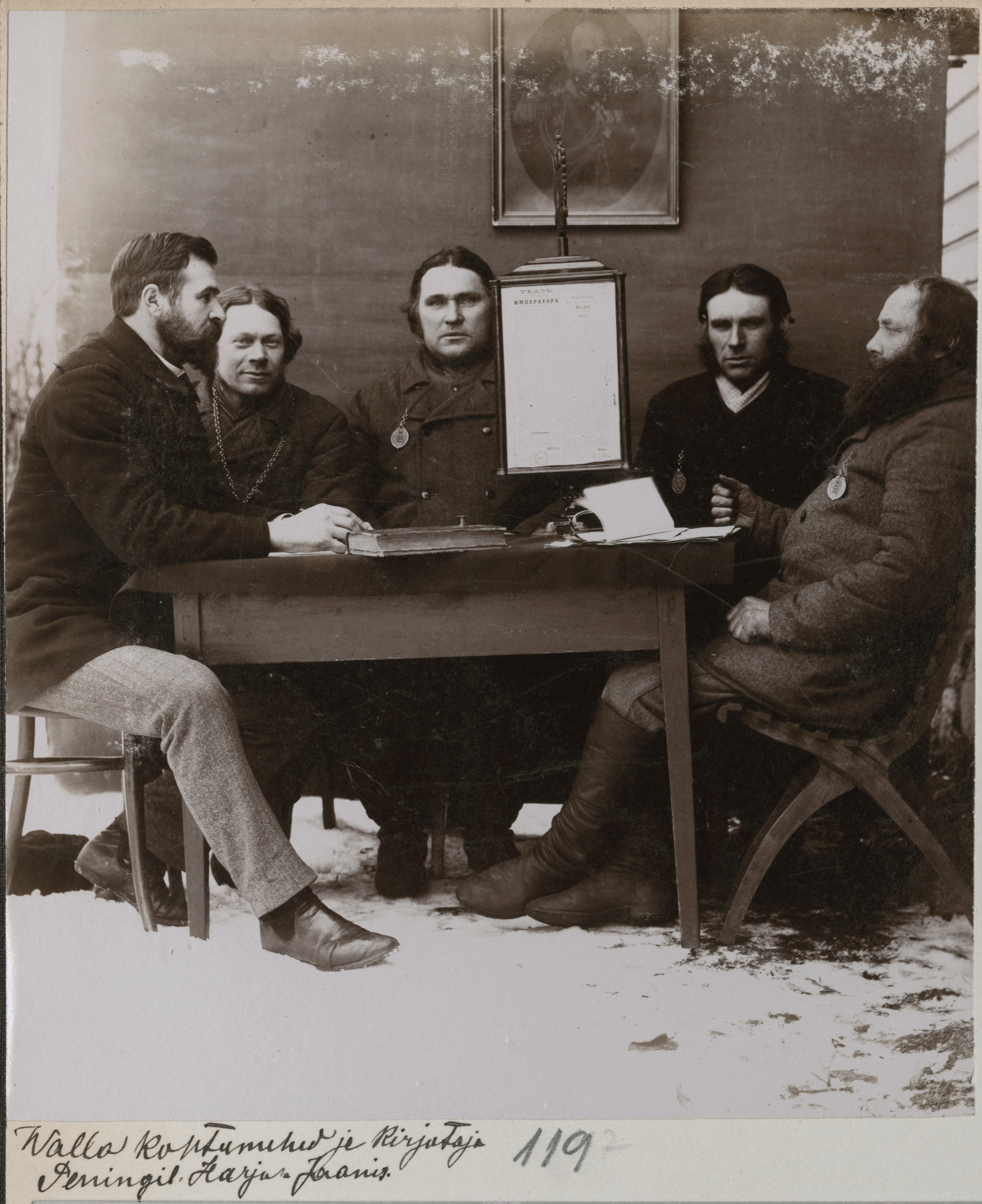 Vallakohtunikud ja -kirjutaja Peningil, Harju-Jaanis.